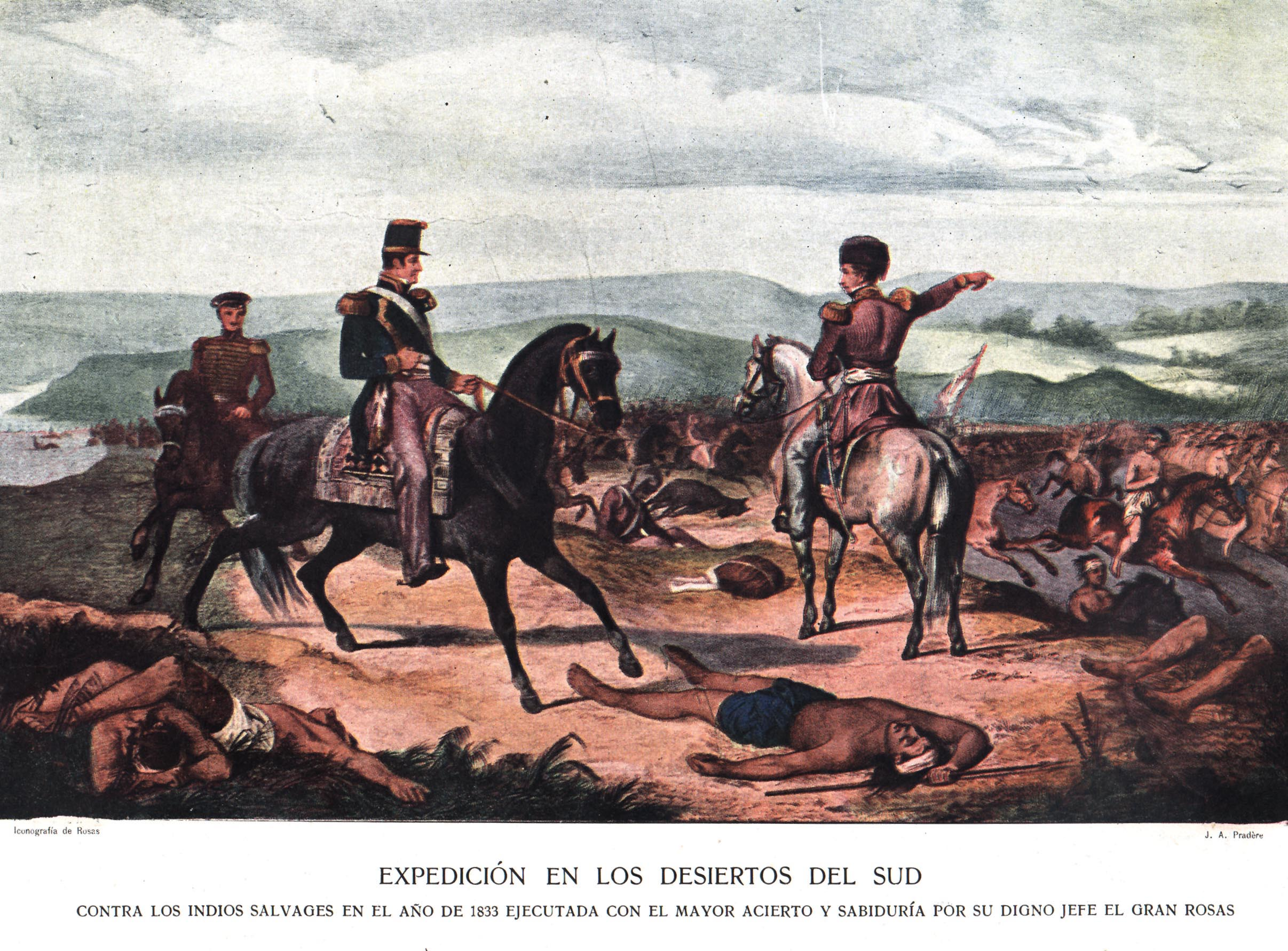 Iconografía Expedición en los desiertos del Sud. Juan Manuel de Rosas, 1833 This file was provided to Wikimedia Commons thanks to an agreement between the Archivo Histórico de la Provincia de Buenos Aires and Wikimedia Argentina.